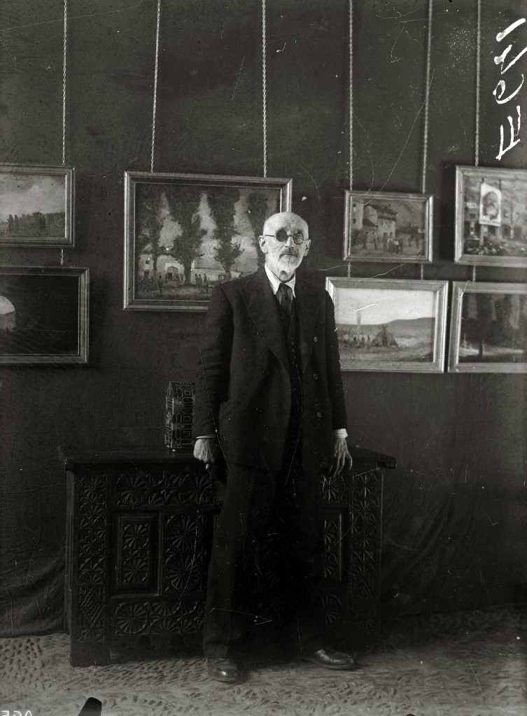 Título original: Ricardo Baroja junto a un grupo de personalidades en una exposición celebrada en el Museo San Telmo (1/2) Localización: San Sebastián (Guipúzcoa)